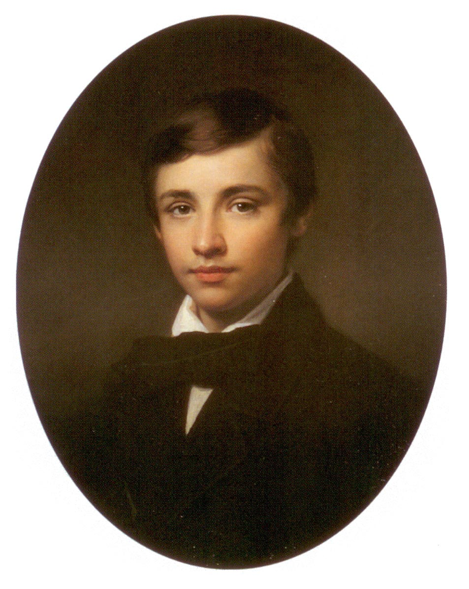 Михаил Николаевич Раевский (1841-1893), сын Н.Н.Раевского, генерал-лейтенант с 1882 года.